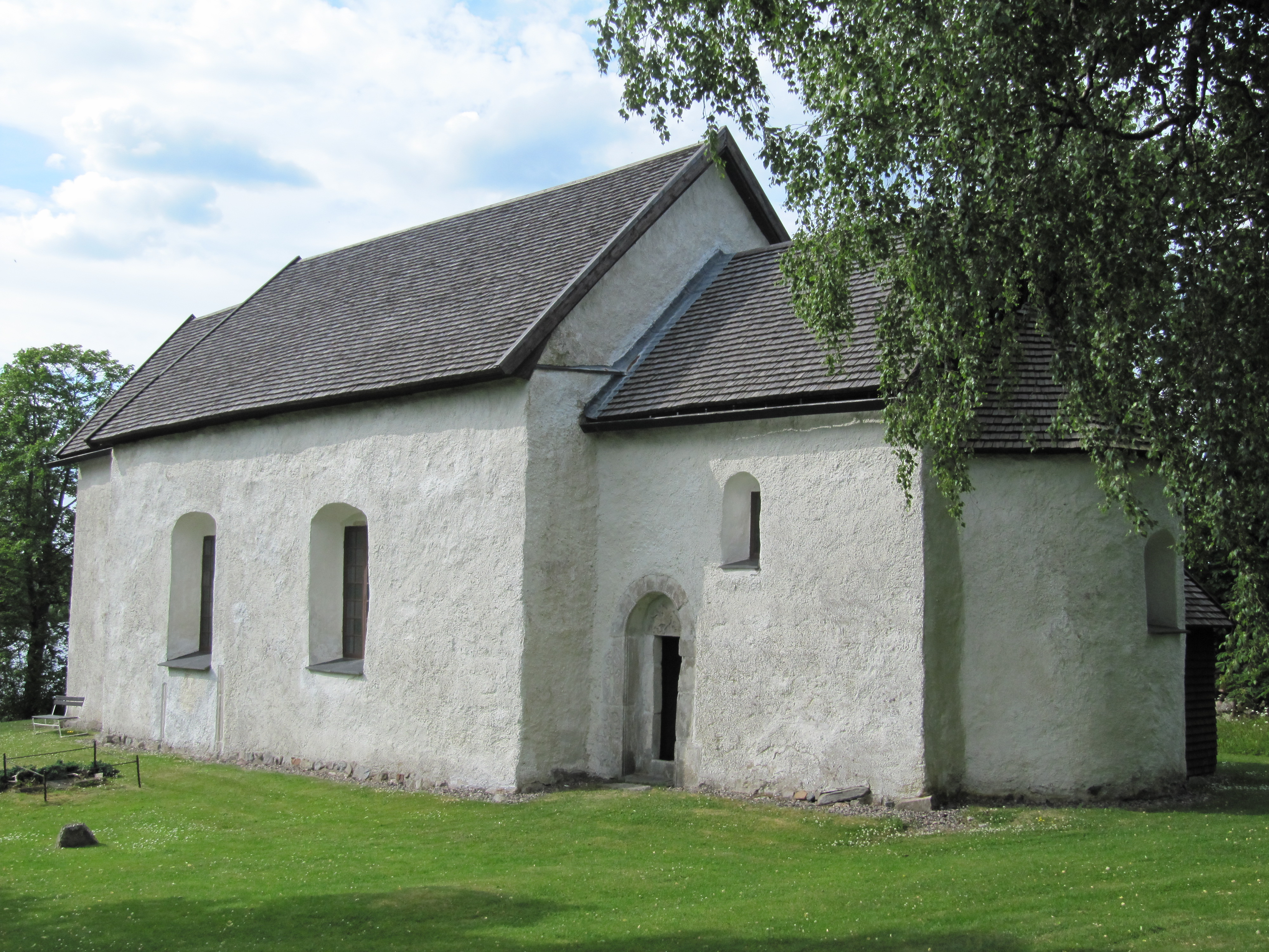 Vallsjö gamla kyrka